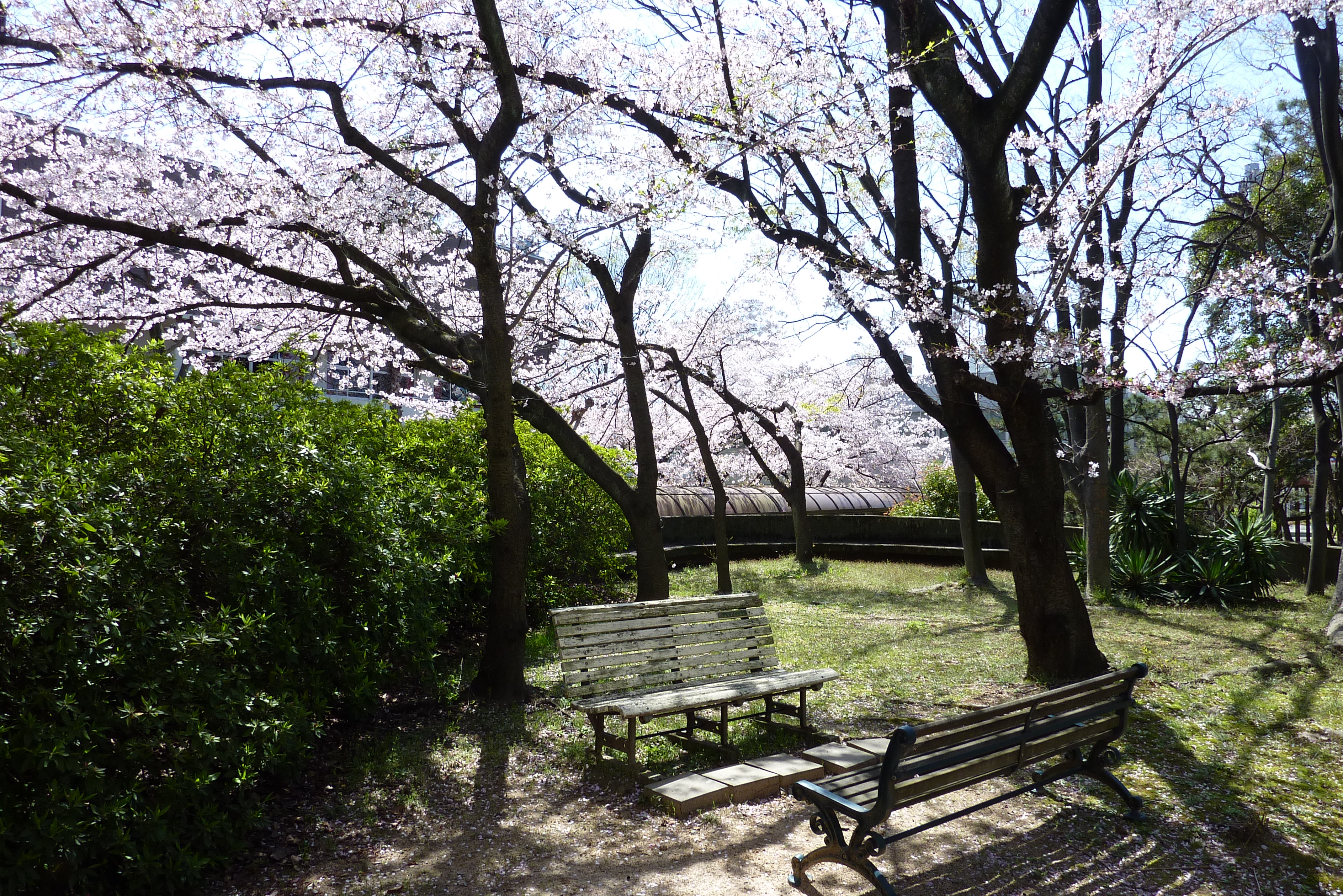 産業技術短期大学キャンパス